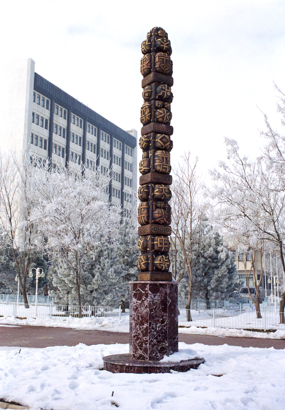 Məzahir Avşar Totem